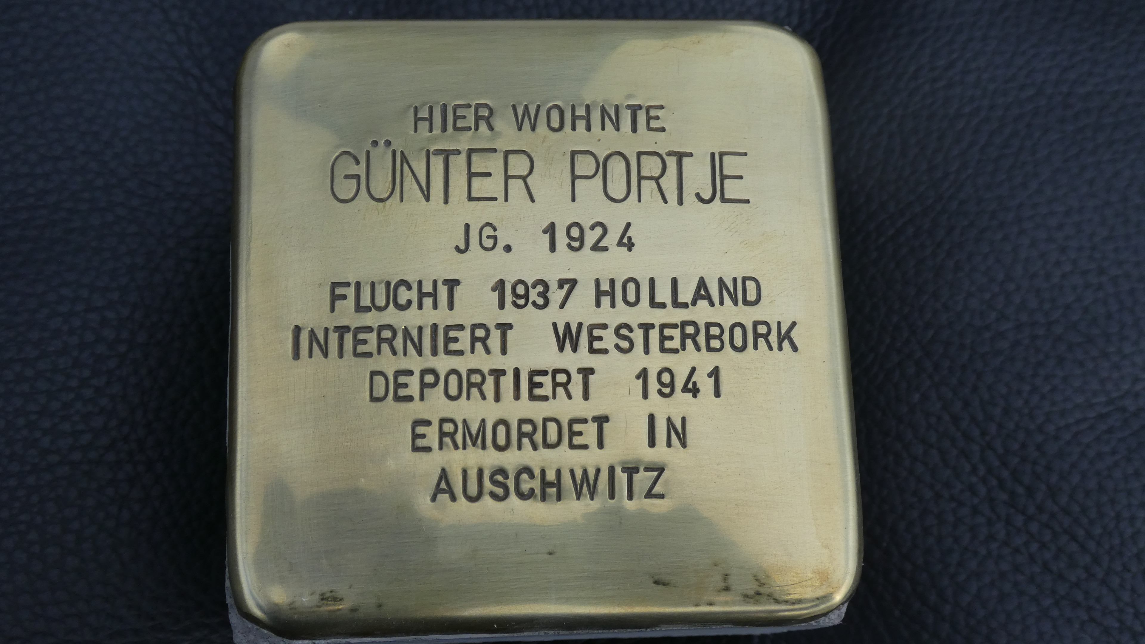 Günter Portje, 2018